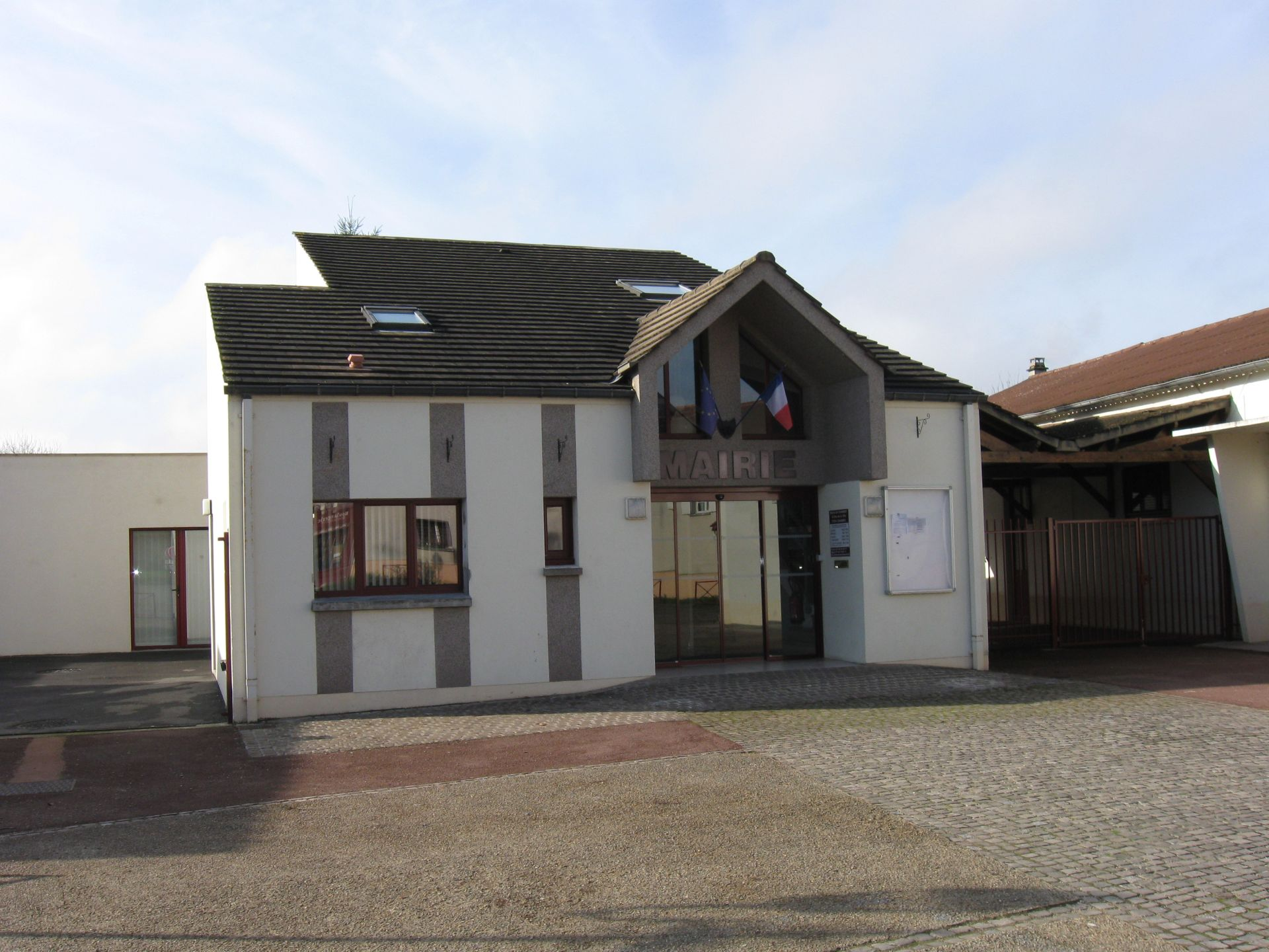 Mairie de Chambry. (département de la Seine-et-Marne, région Île-de-France).